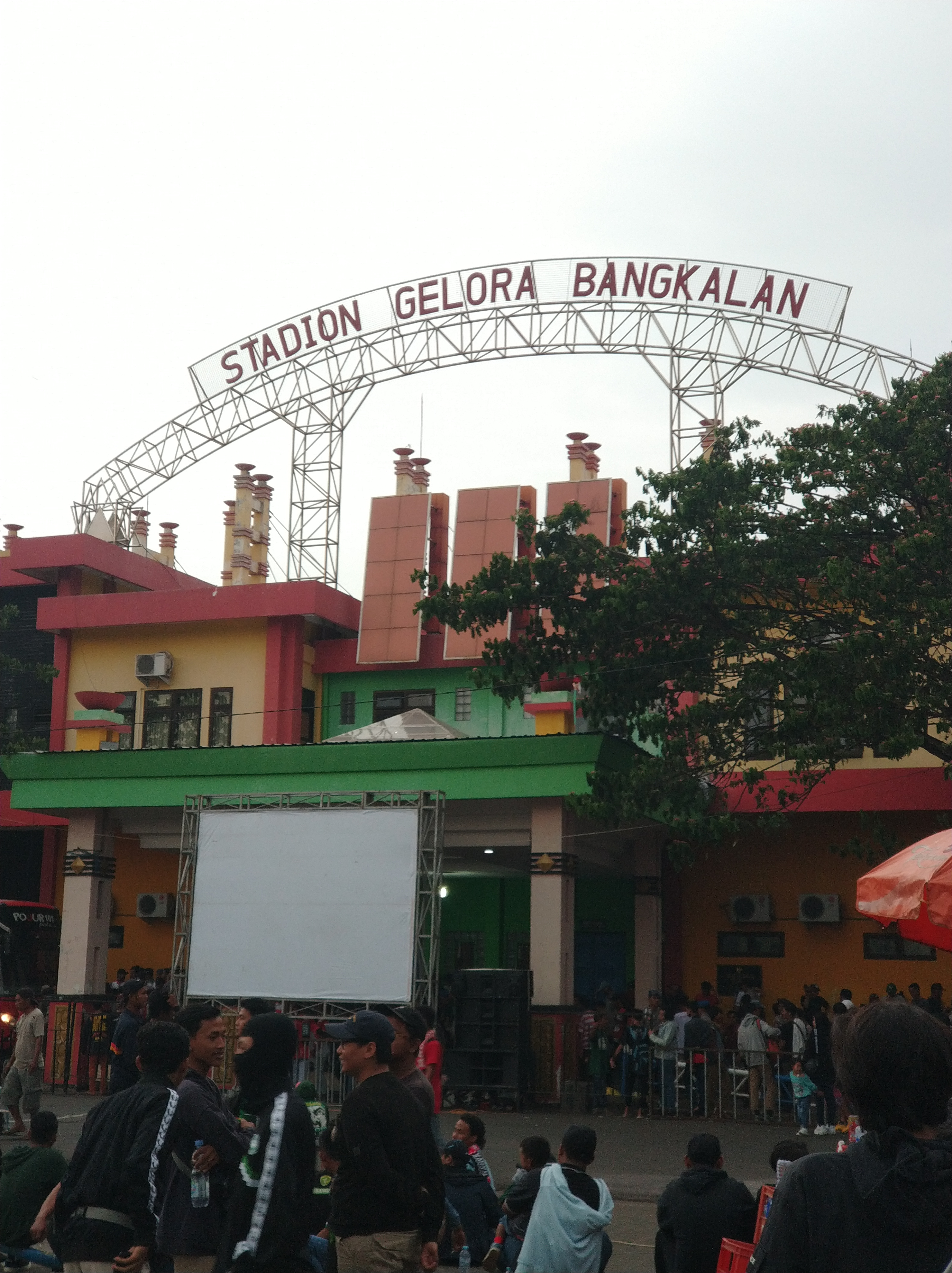 Main entrance of the Stadion Gelora Bangkalan in Madura